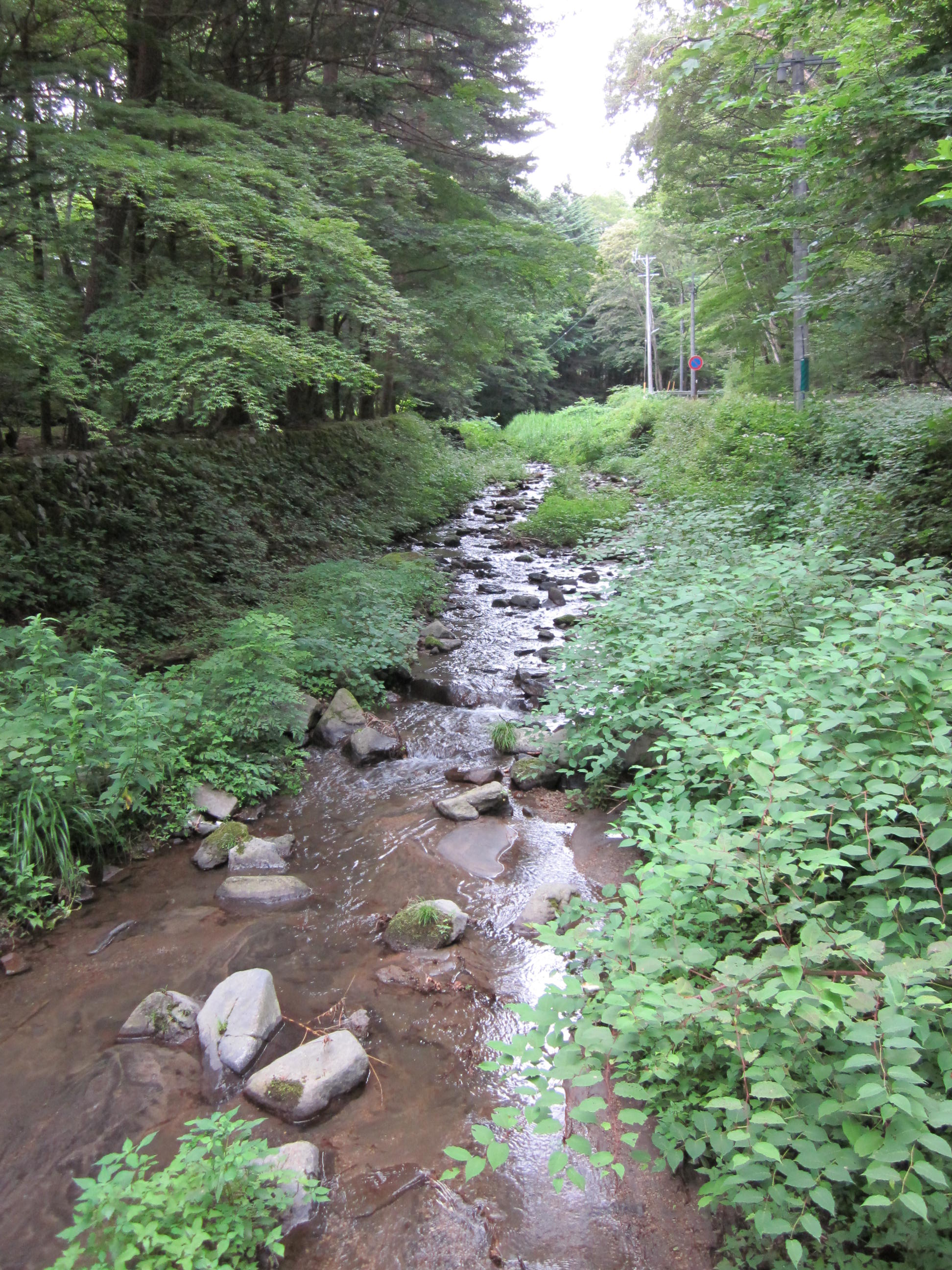 一級河川矢ケ崎川（長野県北佐久郡軽井沢町）